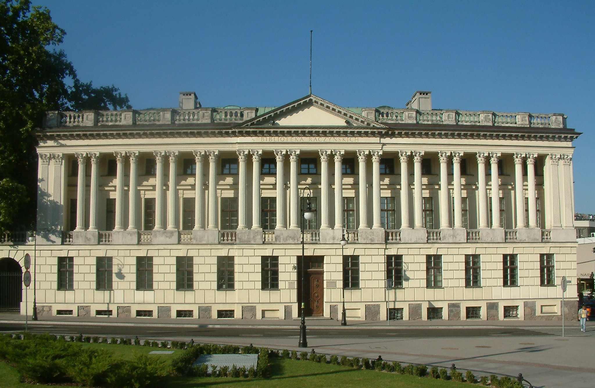 Raczyński Library in Poznań, Poland